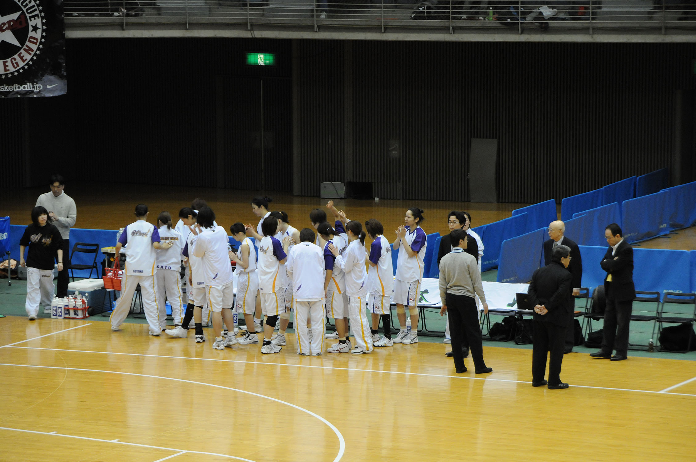 アイシンAWウィングス、とどろきアリーナで